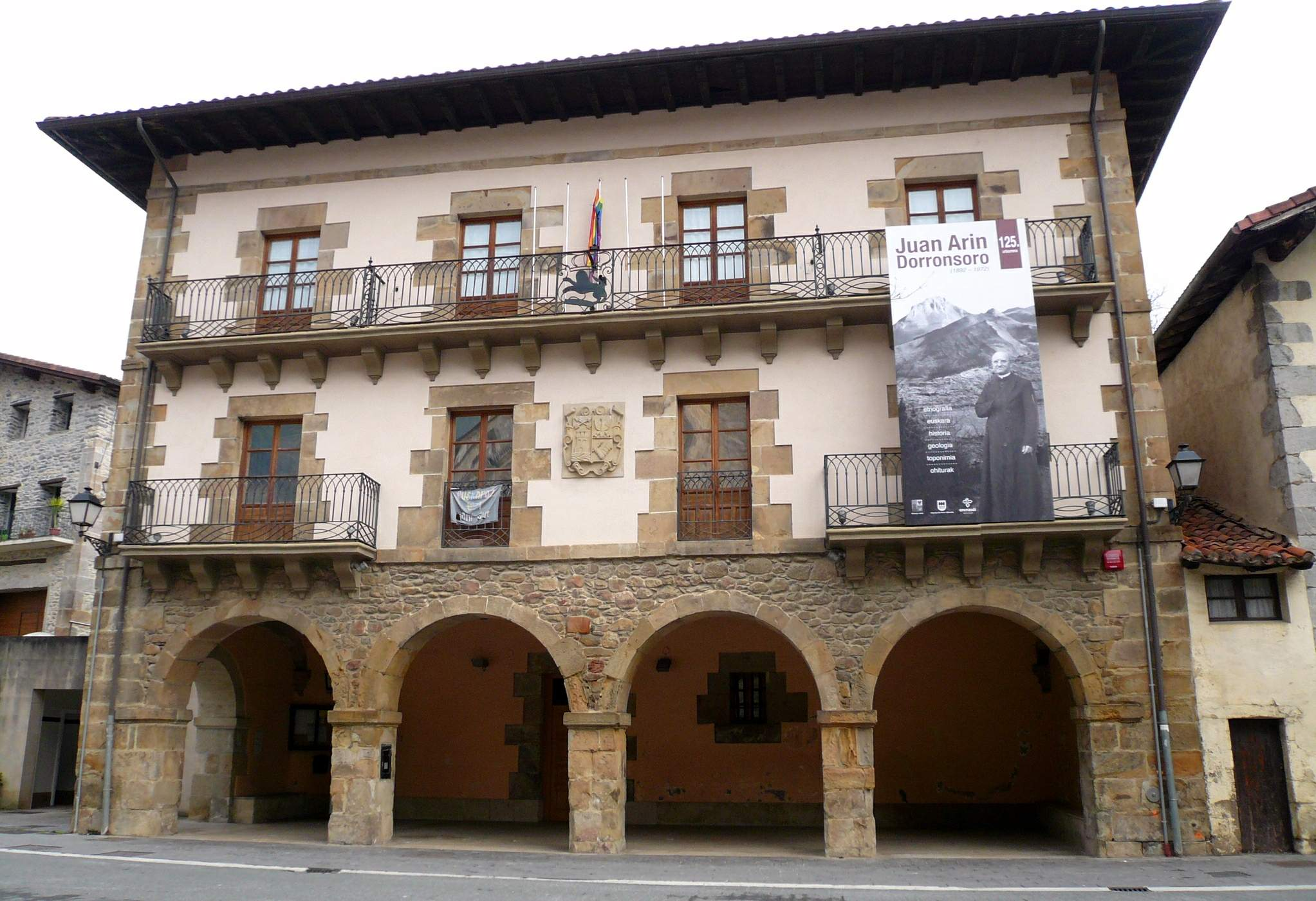 Ayuntamiento de Ataun, en el barrio de San Martín (Guipúzcoa)